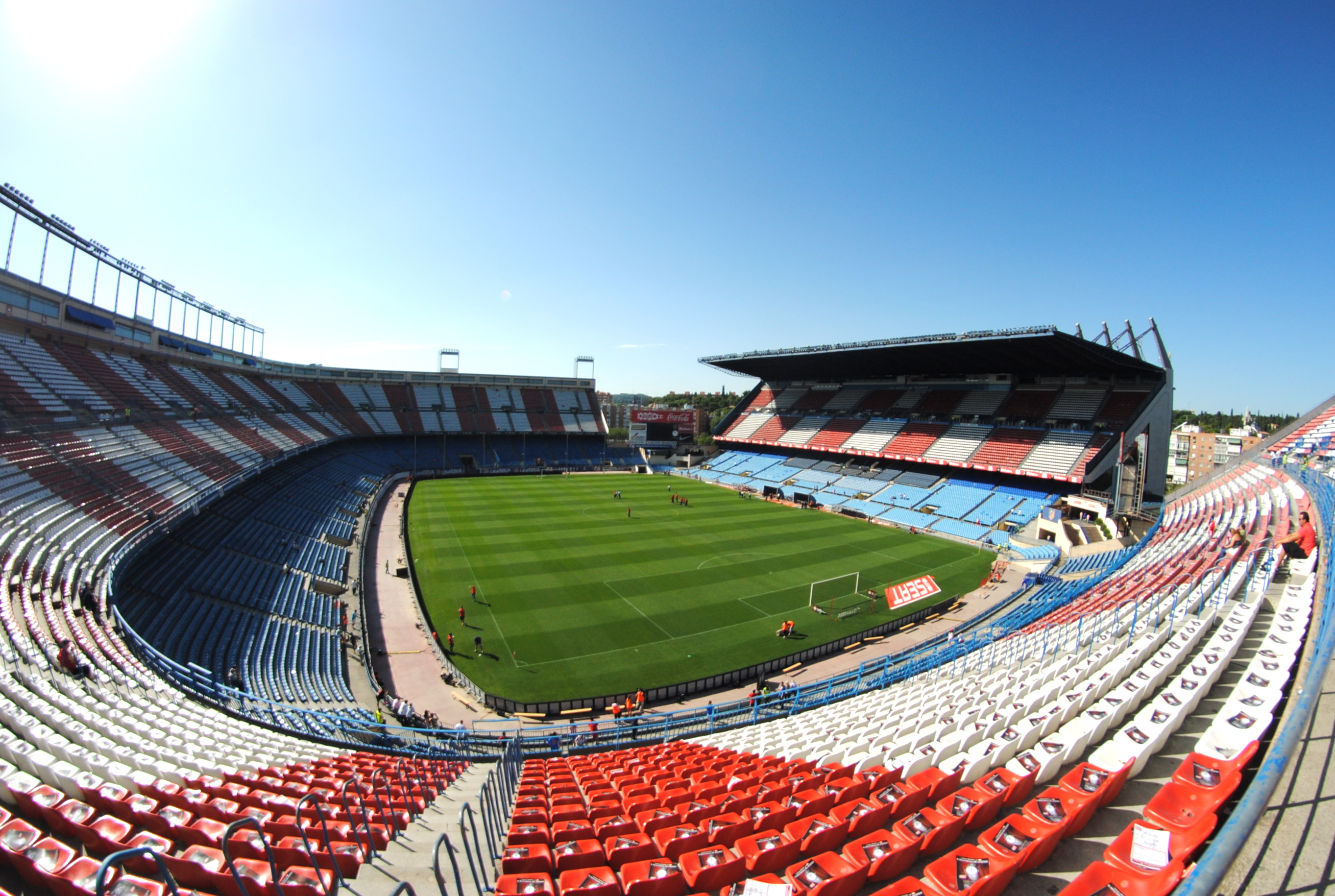 Estadio Wanda Metropolitano, home of Atlético de Madrid football club.